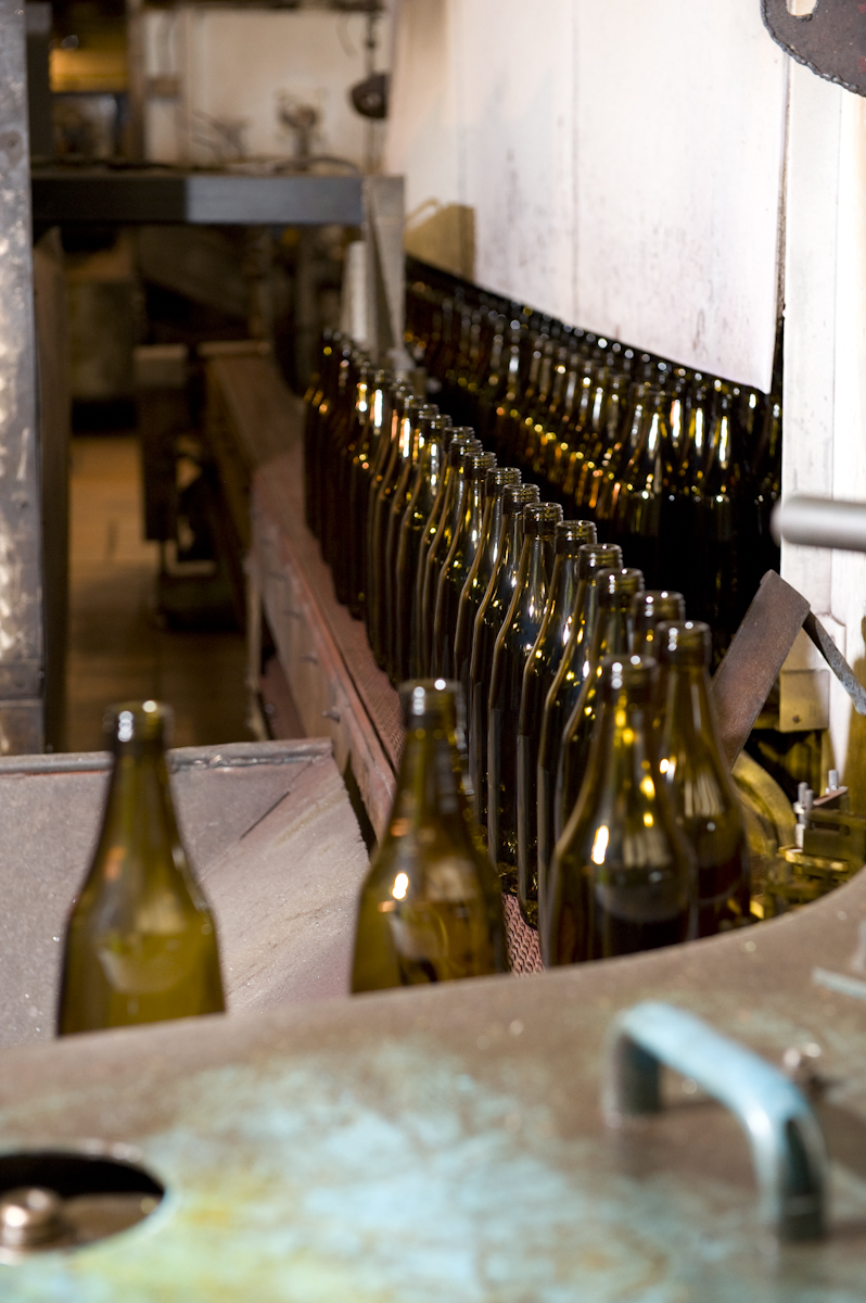 Nuevas botellas de cerveza a partir del calcín, completándose el ciclo de la economía circular.